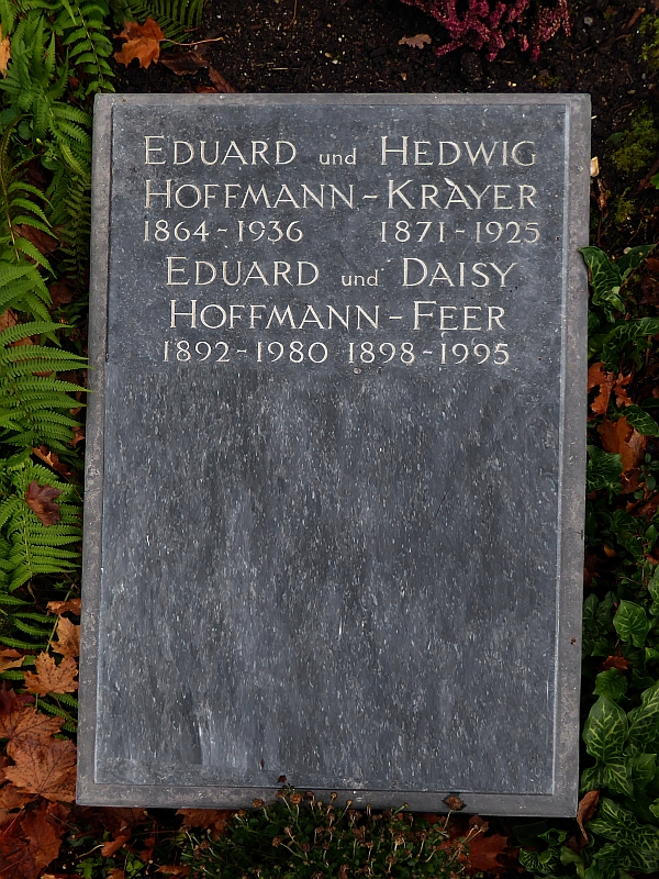 Eduard Hoffmann-Krayer (1864–1936) Philologe, Sprachwissenschaftler, Germanist, Volkskundler, Autor, Grab auf dem Friedhof Wolfgottesacker, Basel